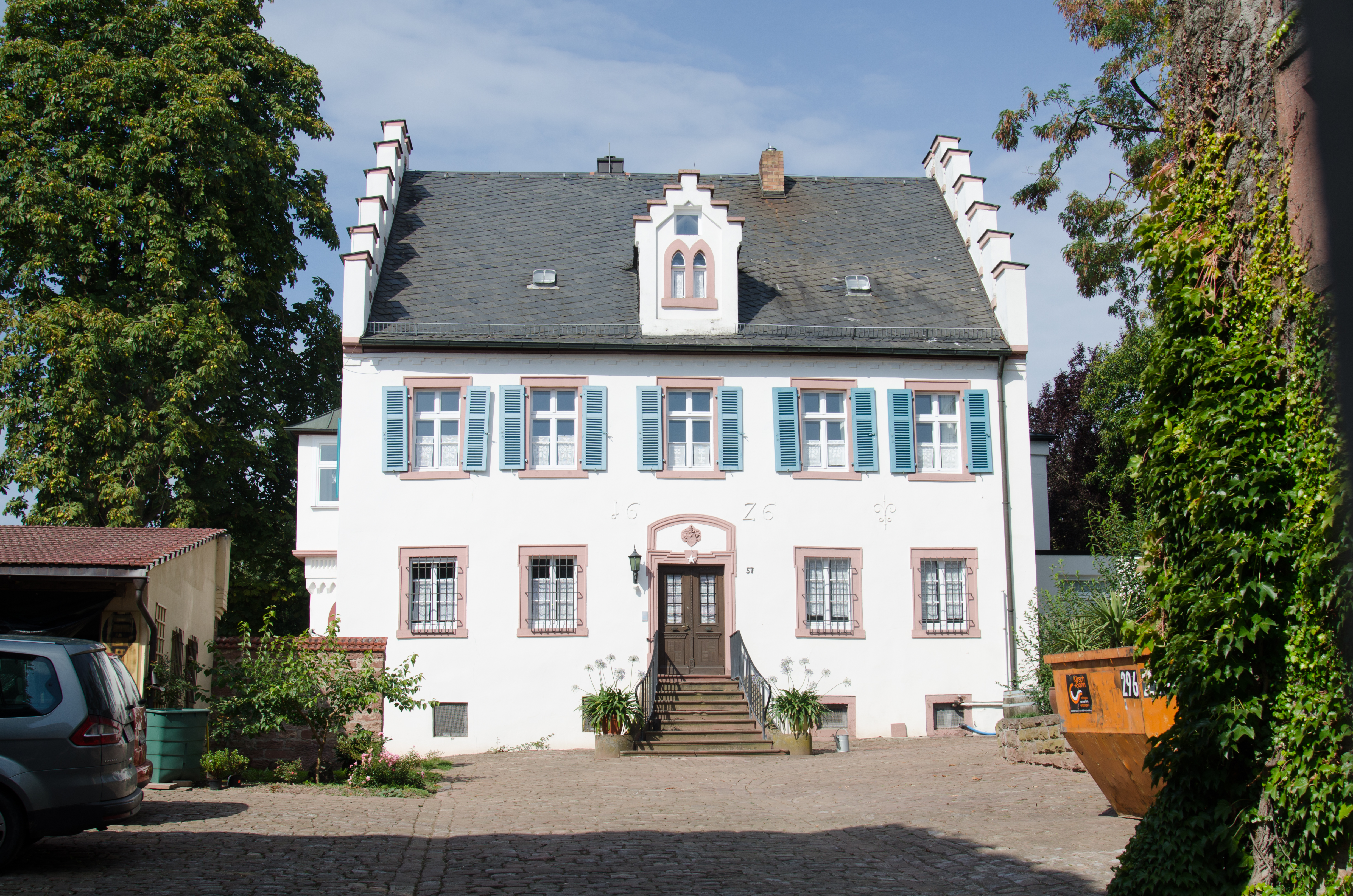 Gemünden am Main, Adelsberg, Adolphsbühlstraße 57